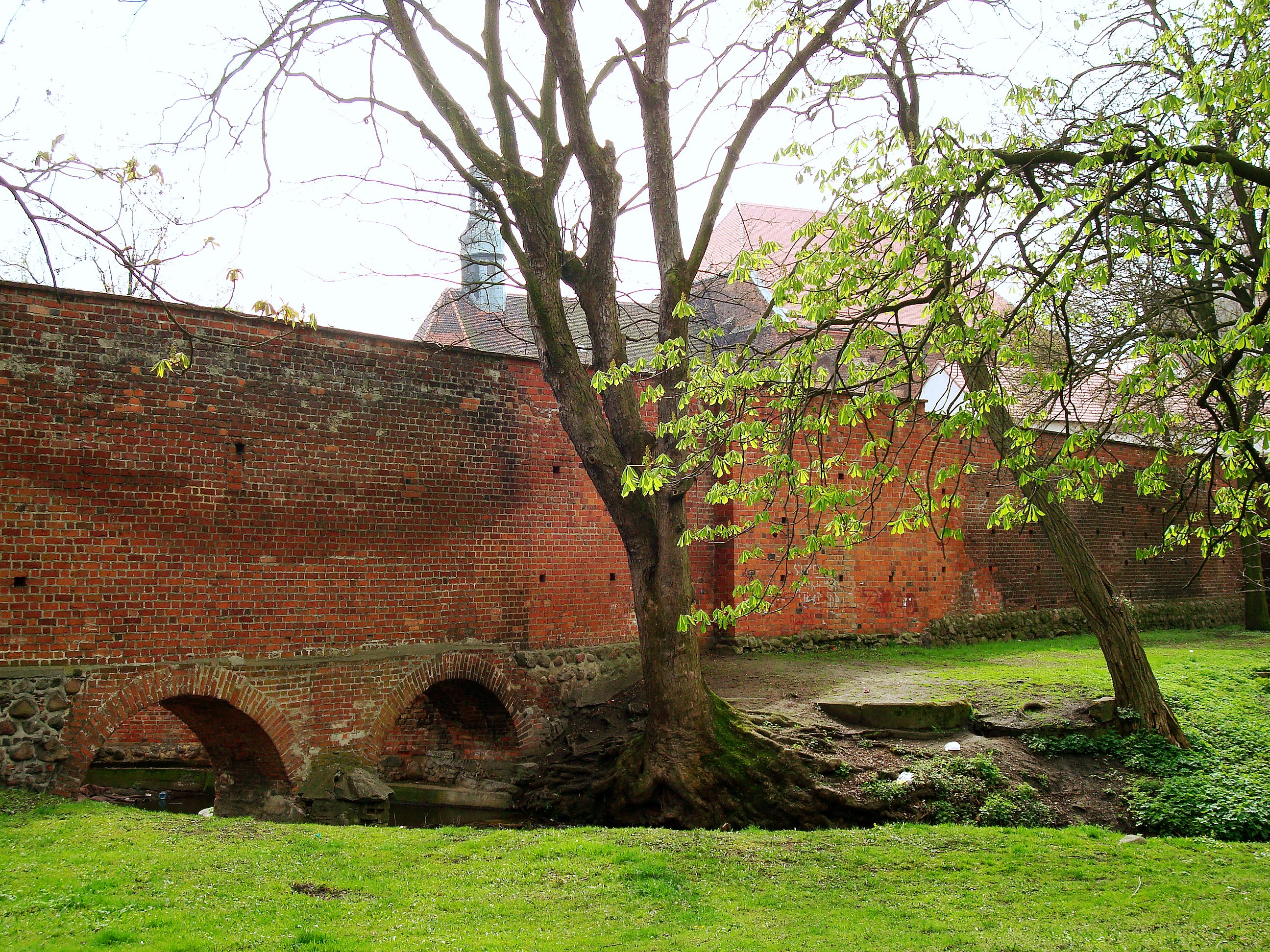 Namysłów - fragment murów miasta